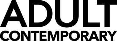 Adult contemporary logo